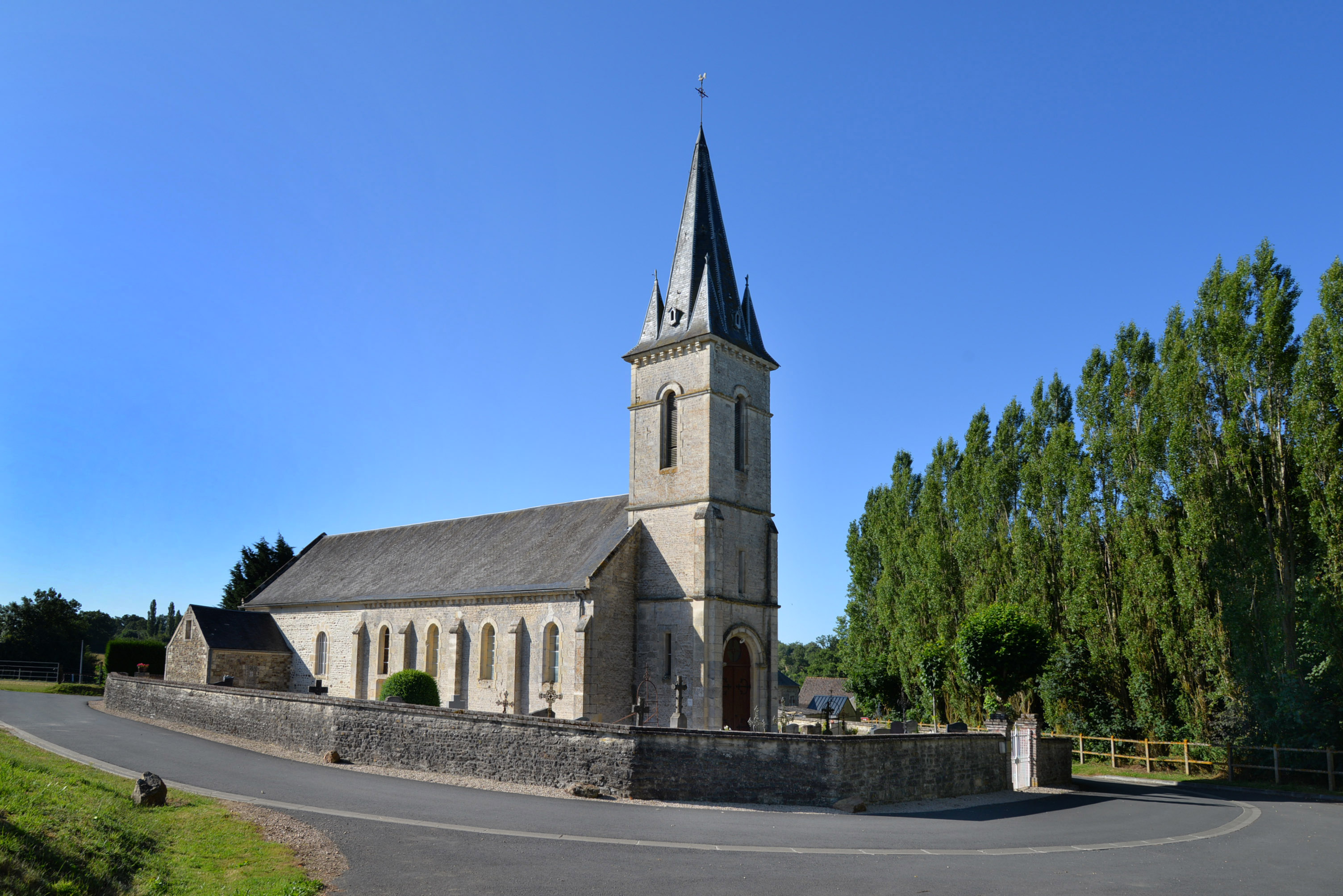 Cordey